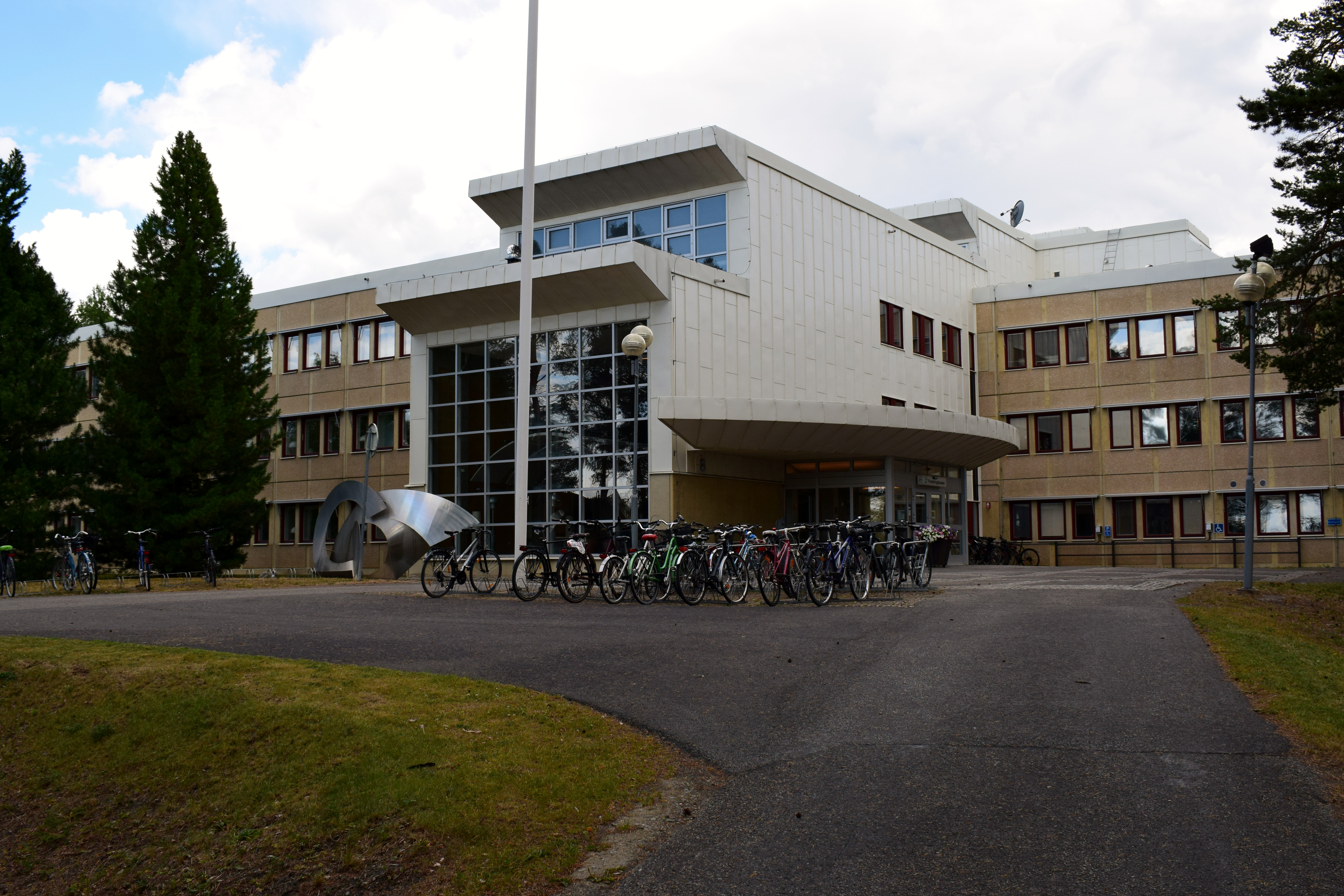 Skolhuset vid Fyrvallavägen, där Arméns tekniska skola, Försvarets förvaltningshögskola och Militärhögskolan Östersund bedrev utbildning.